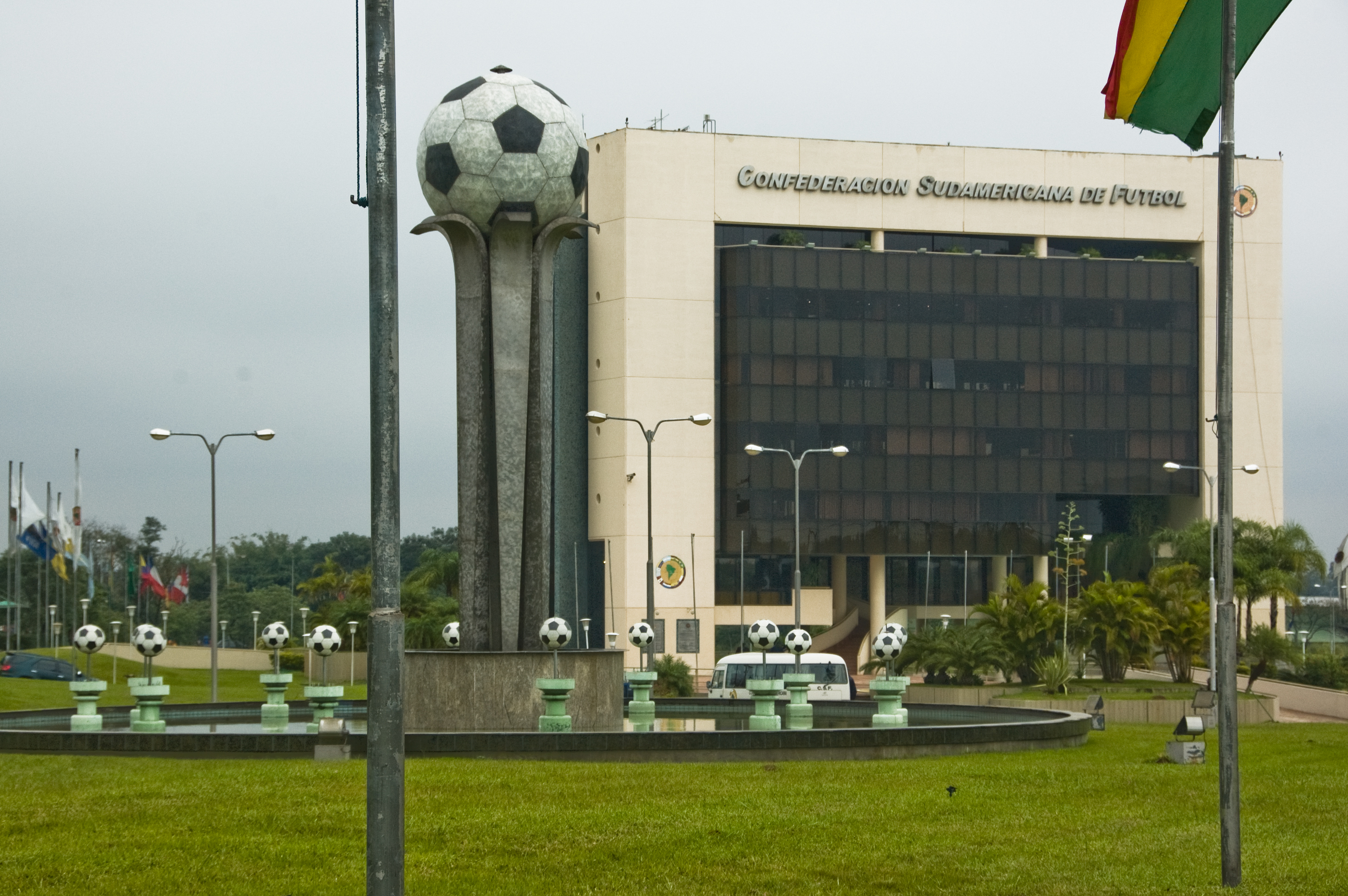 Gebäude der Confederación Sudamericana de Fútbol COMNEBOL in Luque, Paraguay